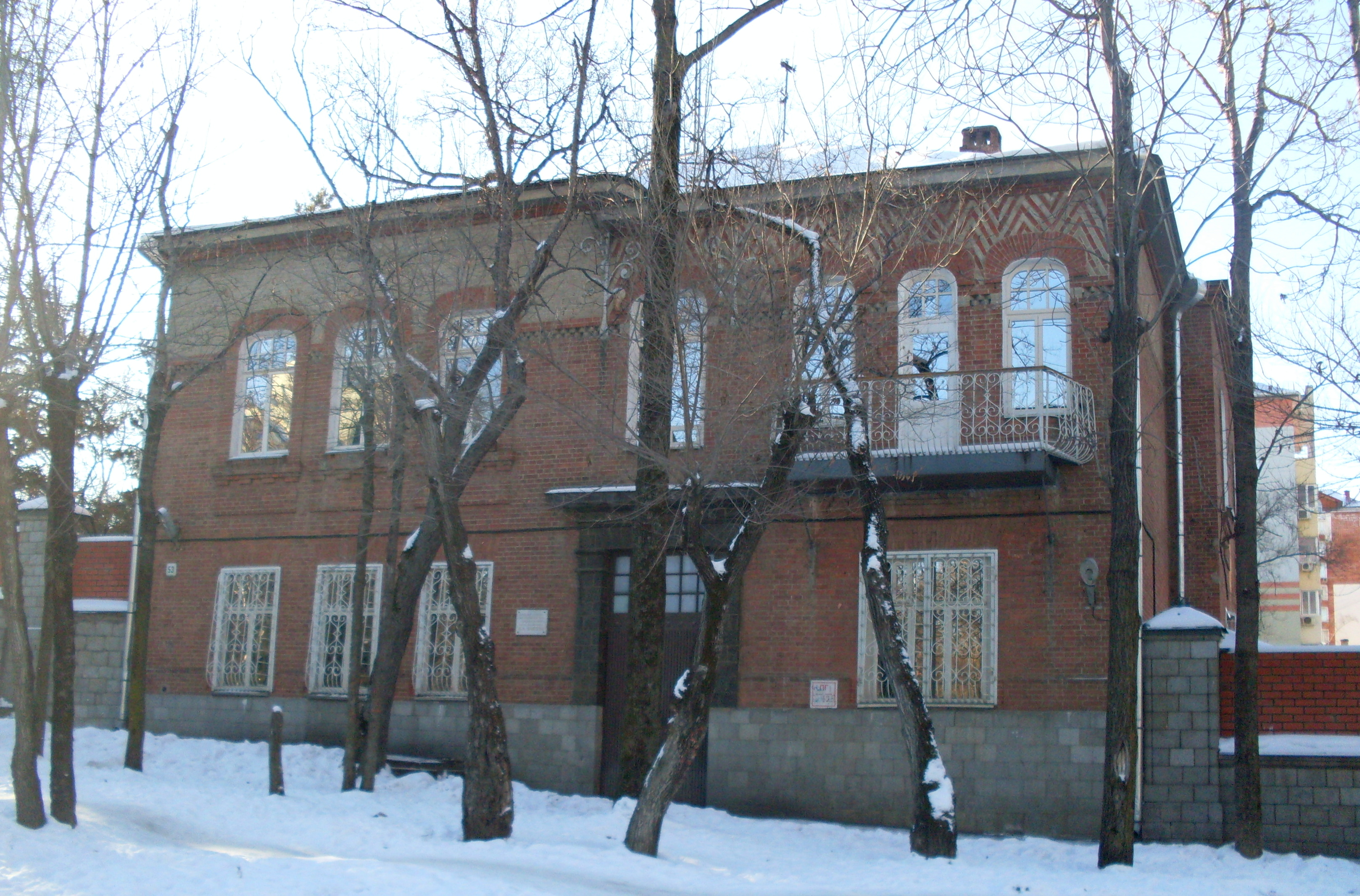 Здание по ул.Истомина в Хабаровске, являвшееся до 1938 года резиденцией маршала В.К.Блюхера